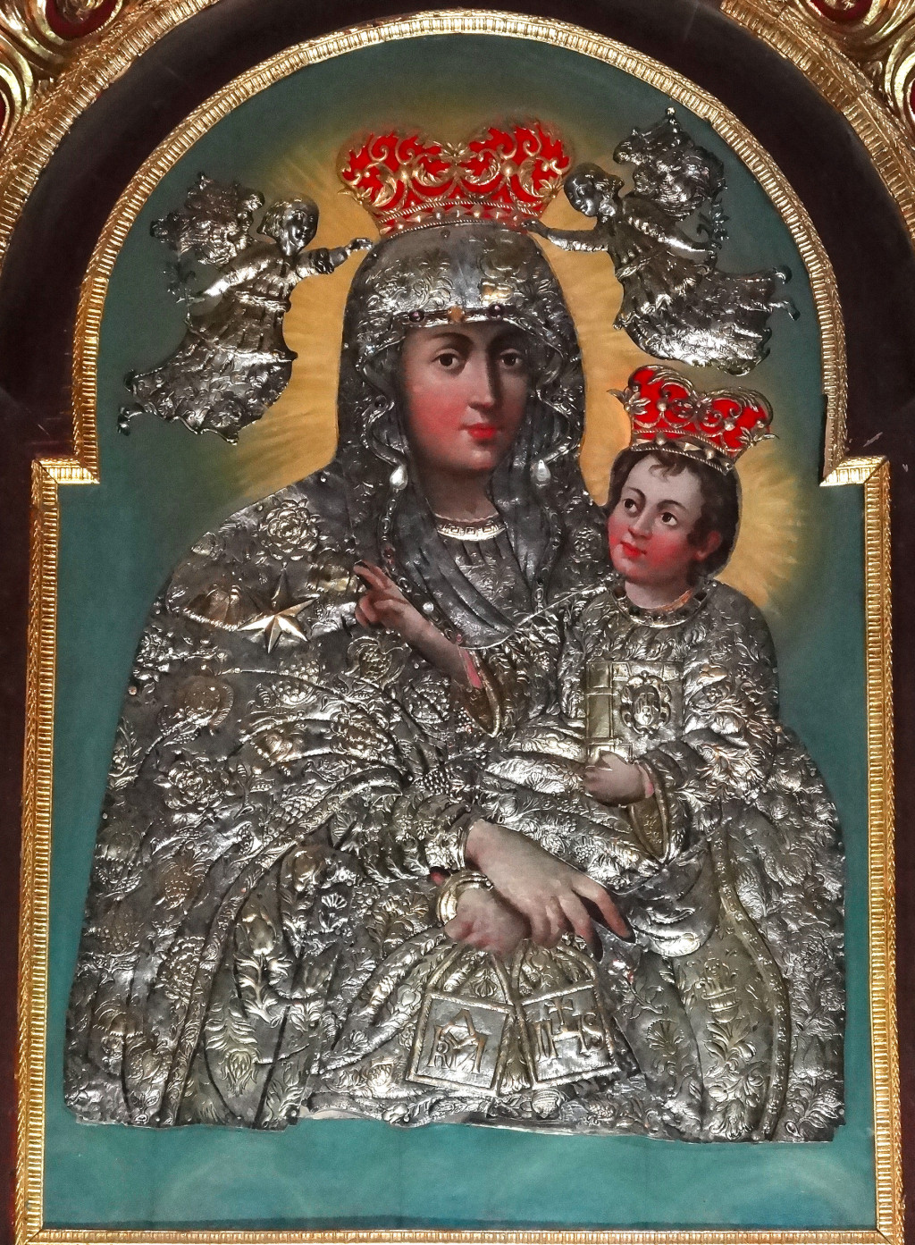 Obraz Matki Bożej Szkaplerznej (XVII/XVIII w.) w ołtarzu bocznym katedry bydgoskiej, w 1820 r. przeniesiony z rozebranego kościoła mariackiego karmelitów, obraz koronowany